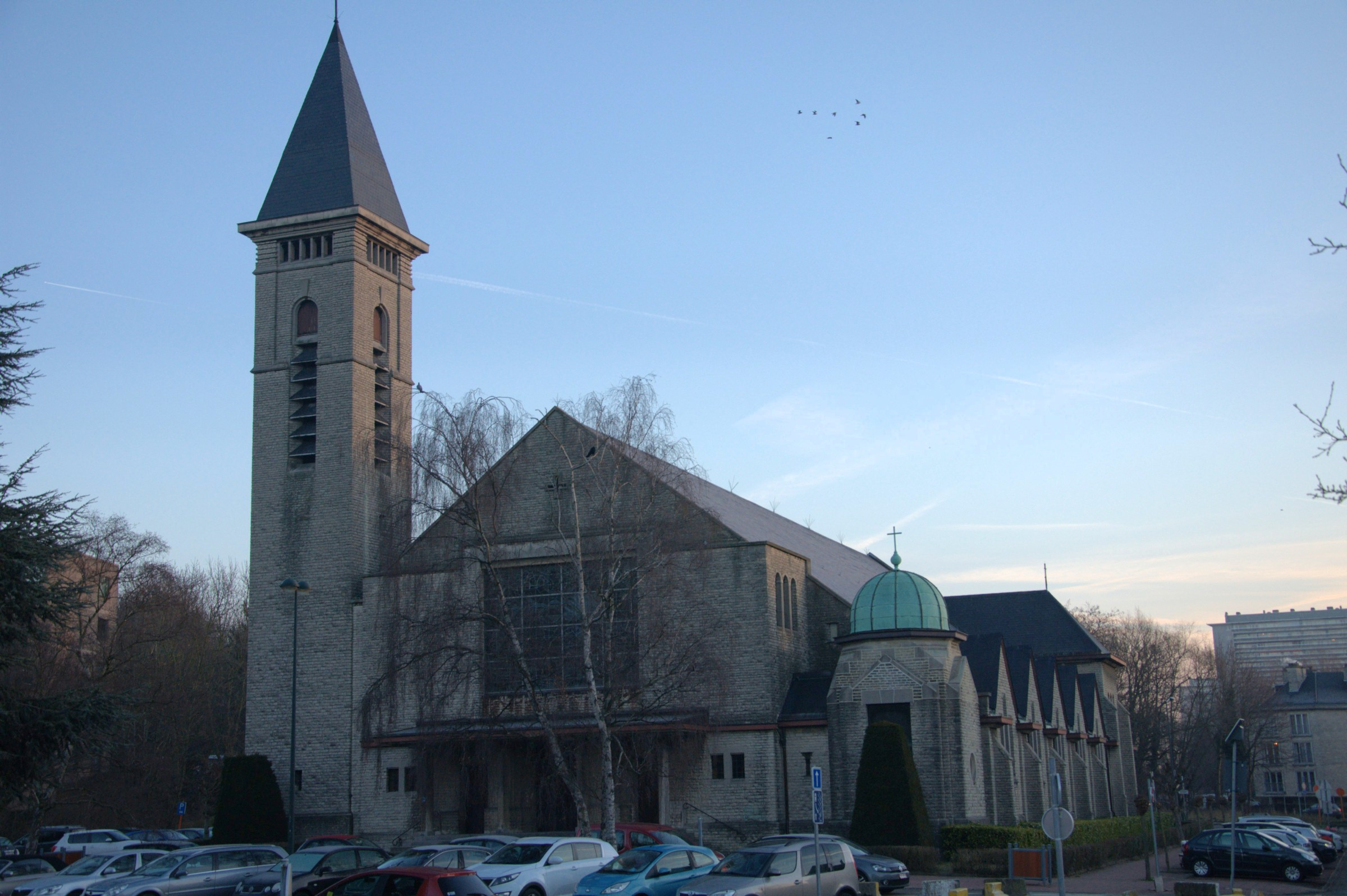 Patrimoine Immobilier de Bruxelles